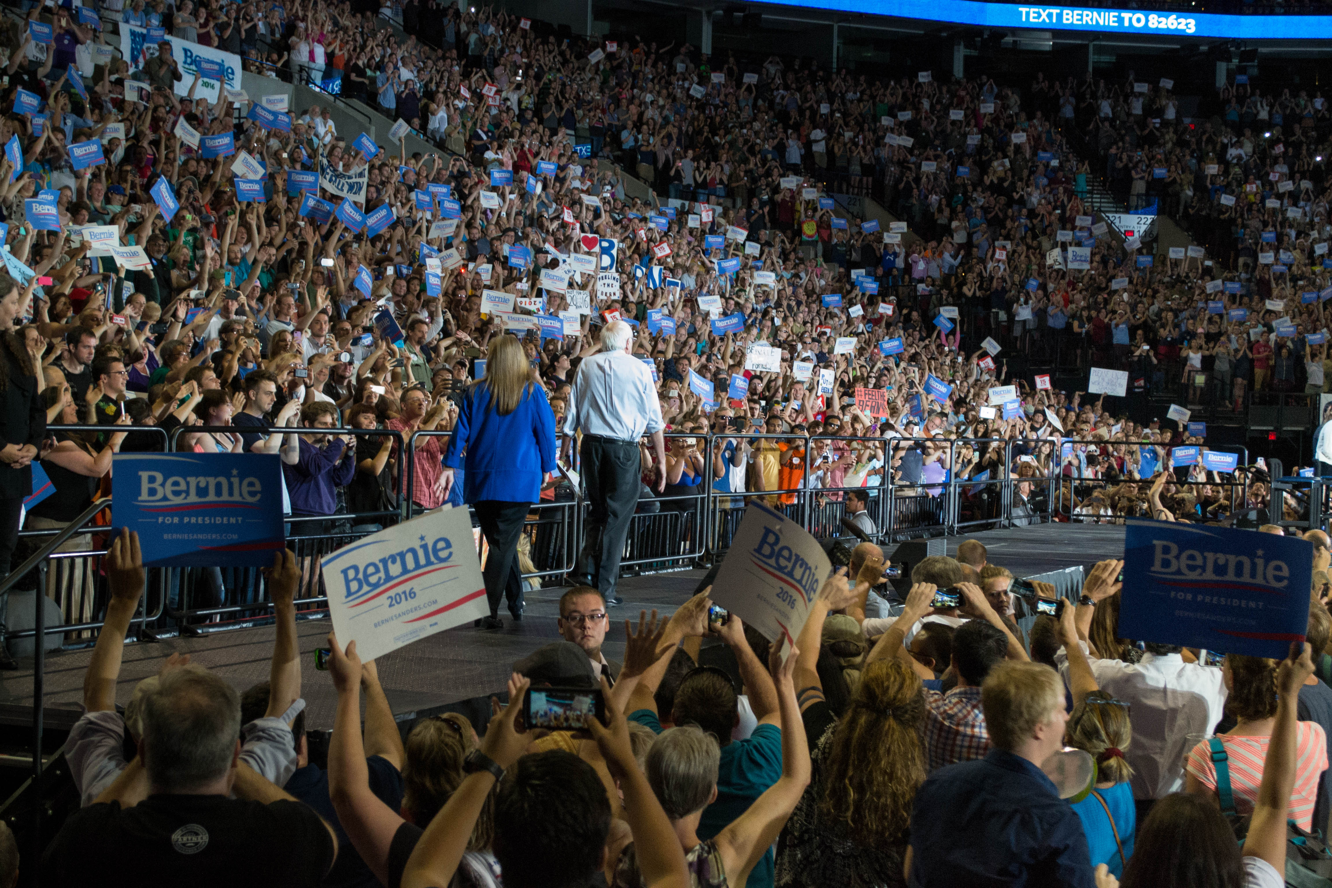 Bernie Sanders Rally